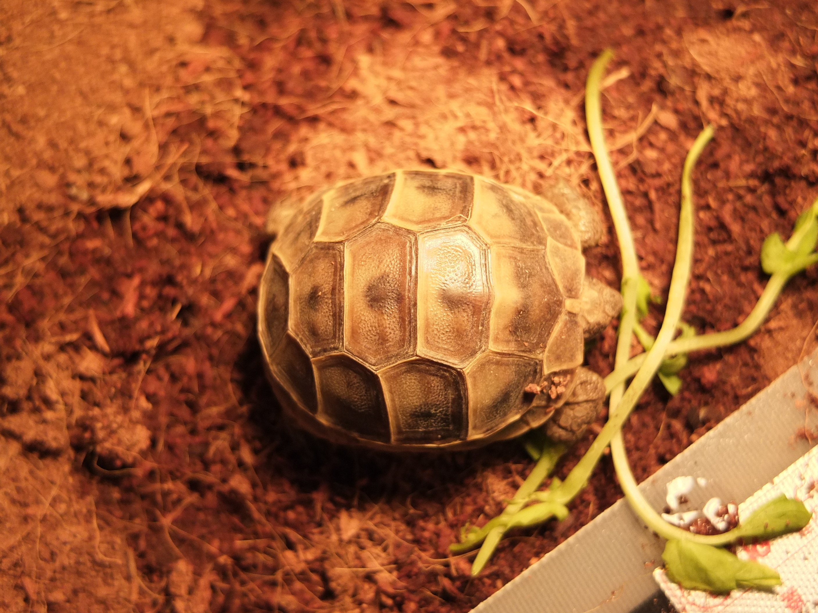 僕が飼育しているイベラギリシャリクガメ(幼体)の甲羅です。 撮影時の甲長4.7cm